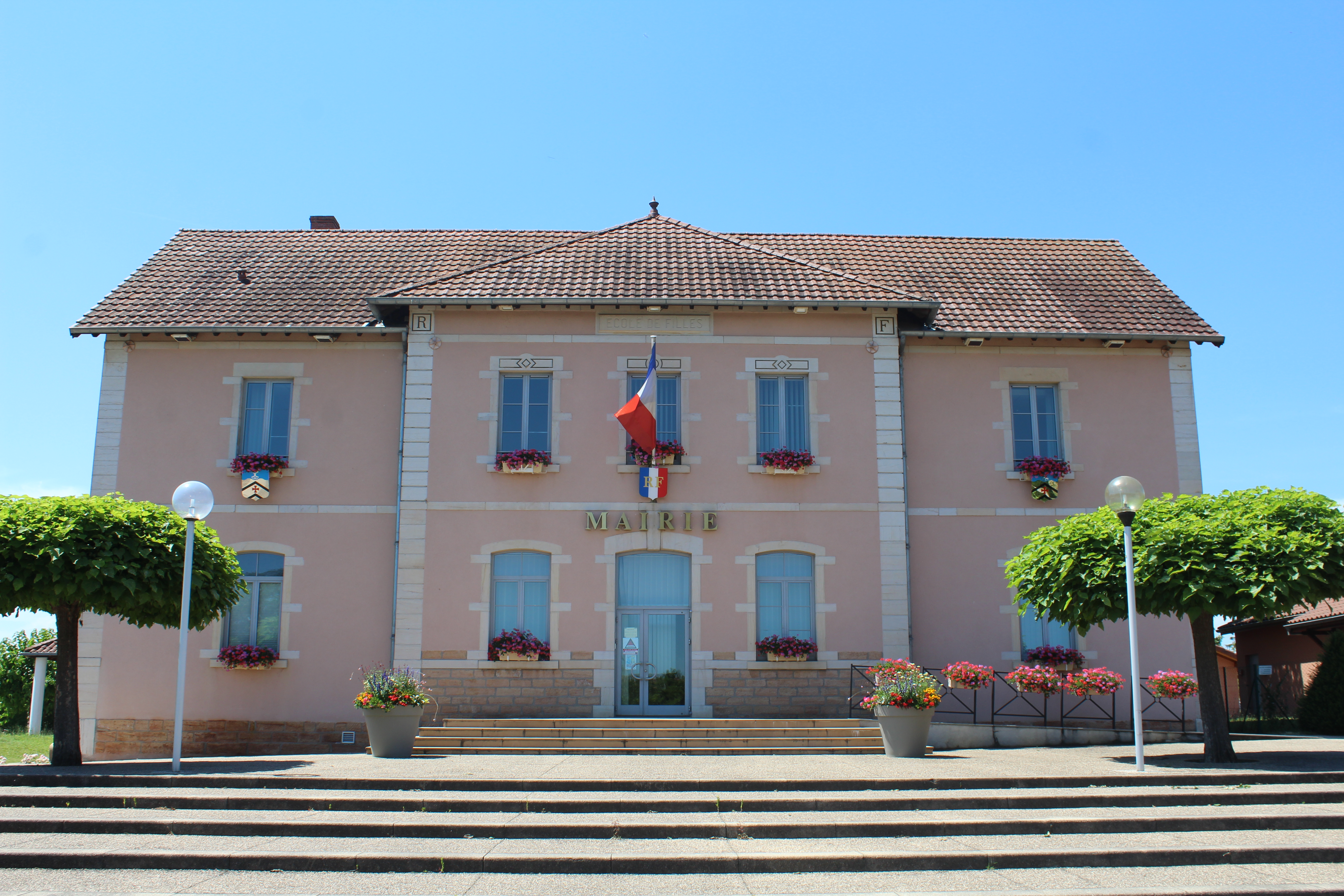 Mairie de Replonges dans l'ancienne école des filles.